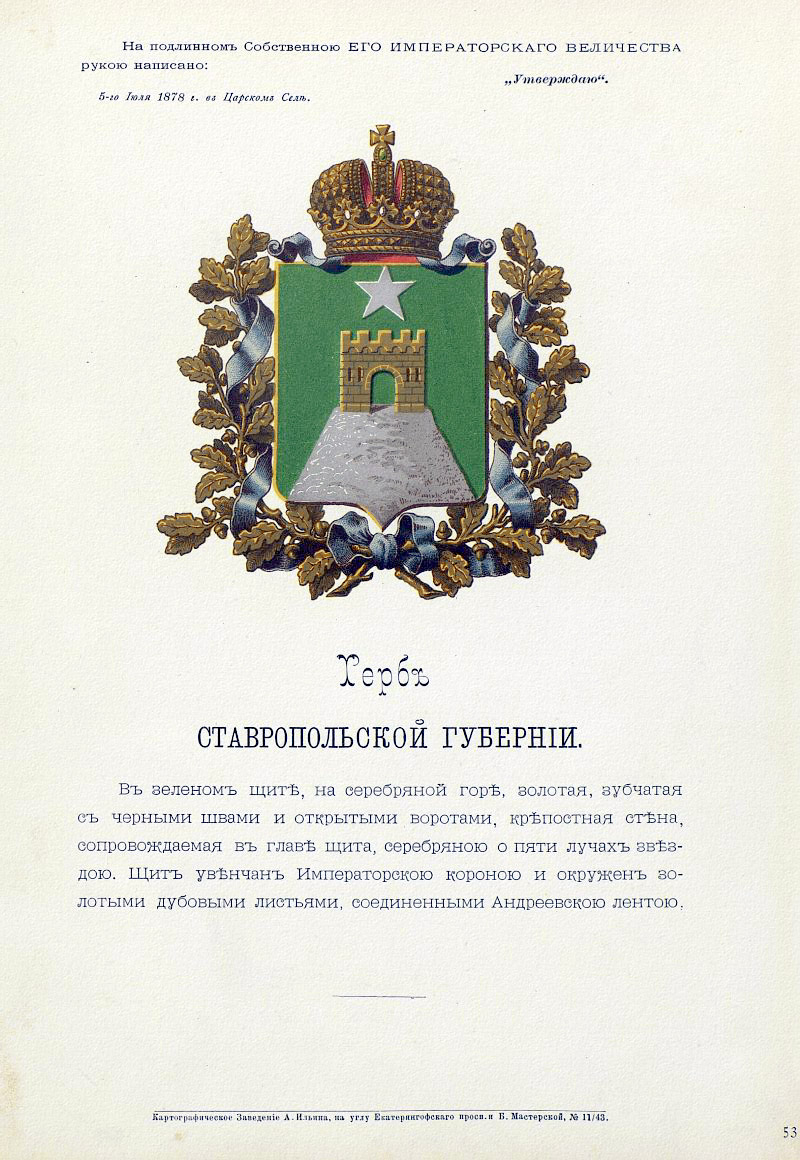 Official Russian Empire coat of arms Stavropol Governorate. Герб Российской Империи Ставропольской губернии с официальным описанием в Гербовнике Бенке. Утверждён Императором Всероссийским Александром Вторым.